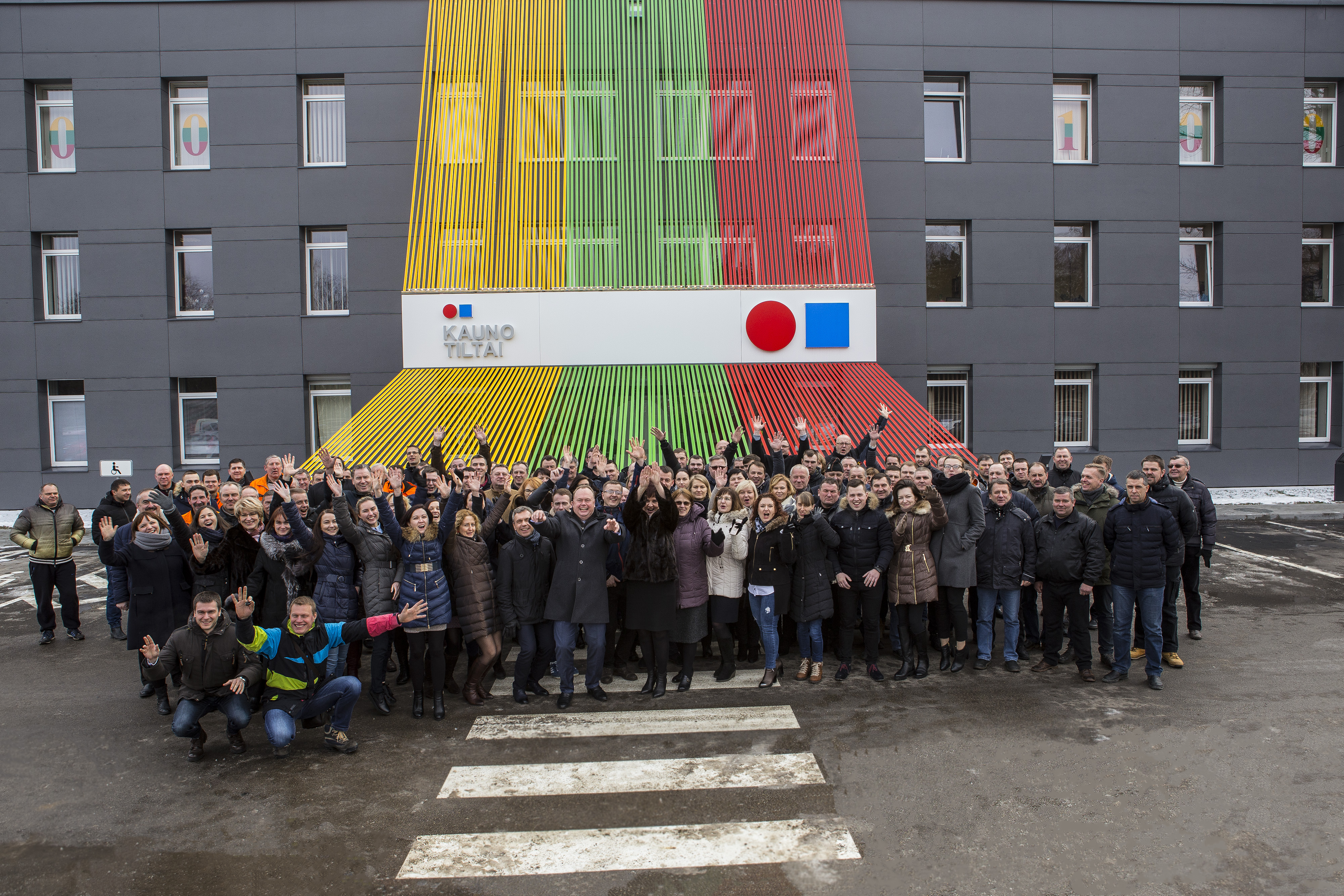 Administracinis pastatas Kaune, Ateities pl. 46